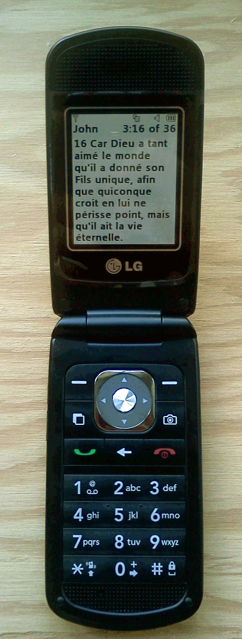 Un LG Madison sur le réseau de TELUS Mobilité avec l'application Go Bible et le verset Jean 3:16 à l'affiche.